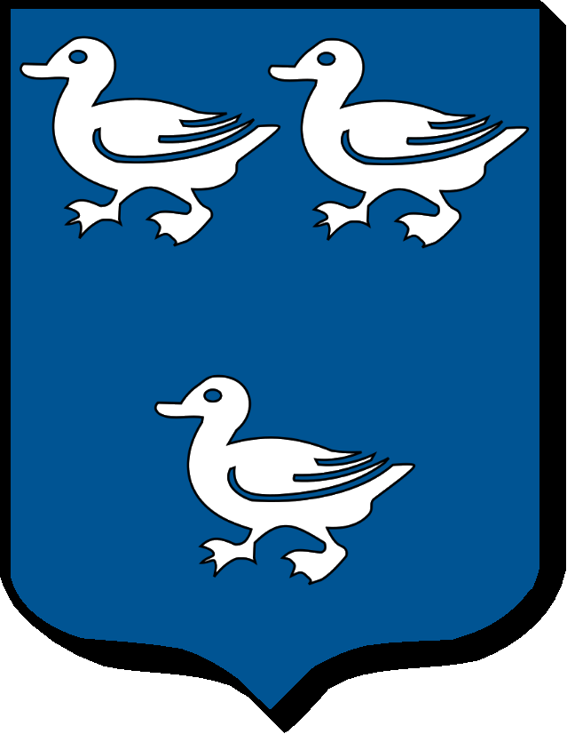 D'azur à trois canettes d'argent, 2 et 1.